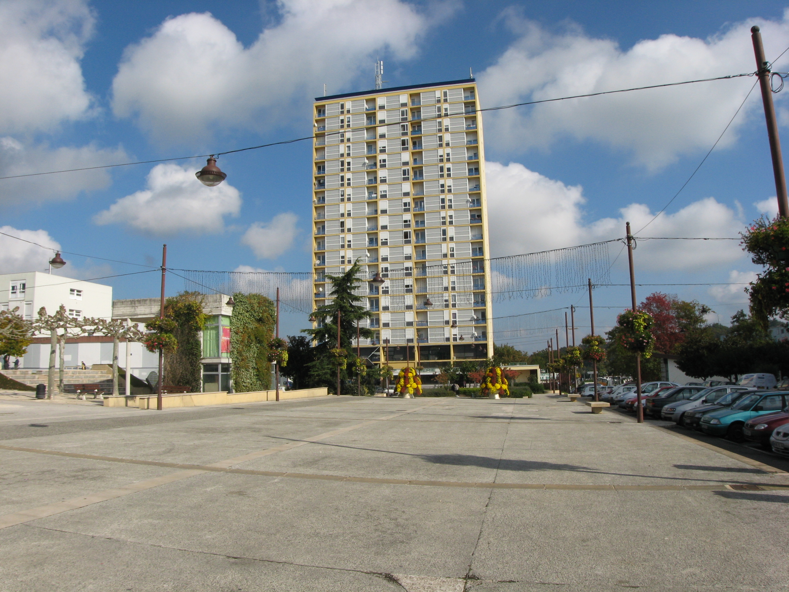 Tour des "célibataires" (17 étages) vue depuis la mairie (Mourenx) (Pyrénées-Atlantiques) Pyrénées).